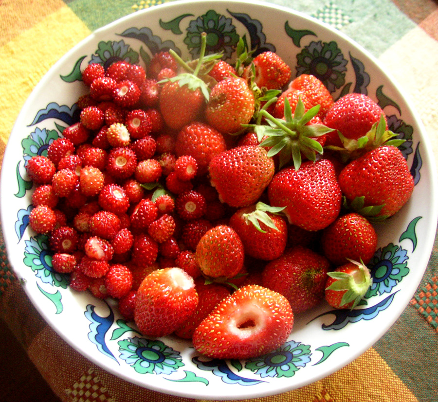 Jordgubbar och smultron i en skål.